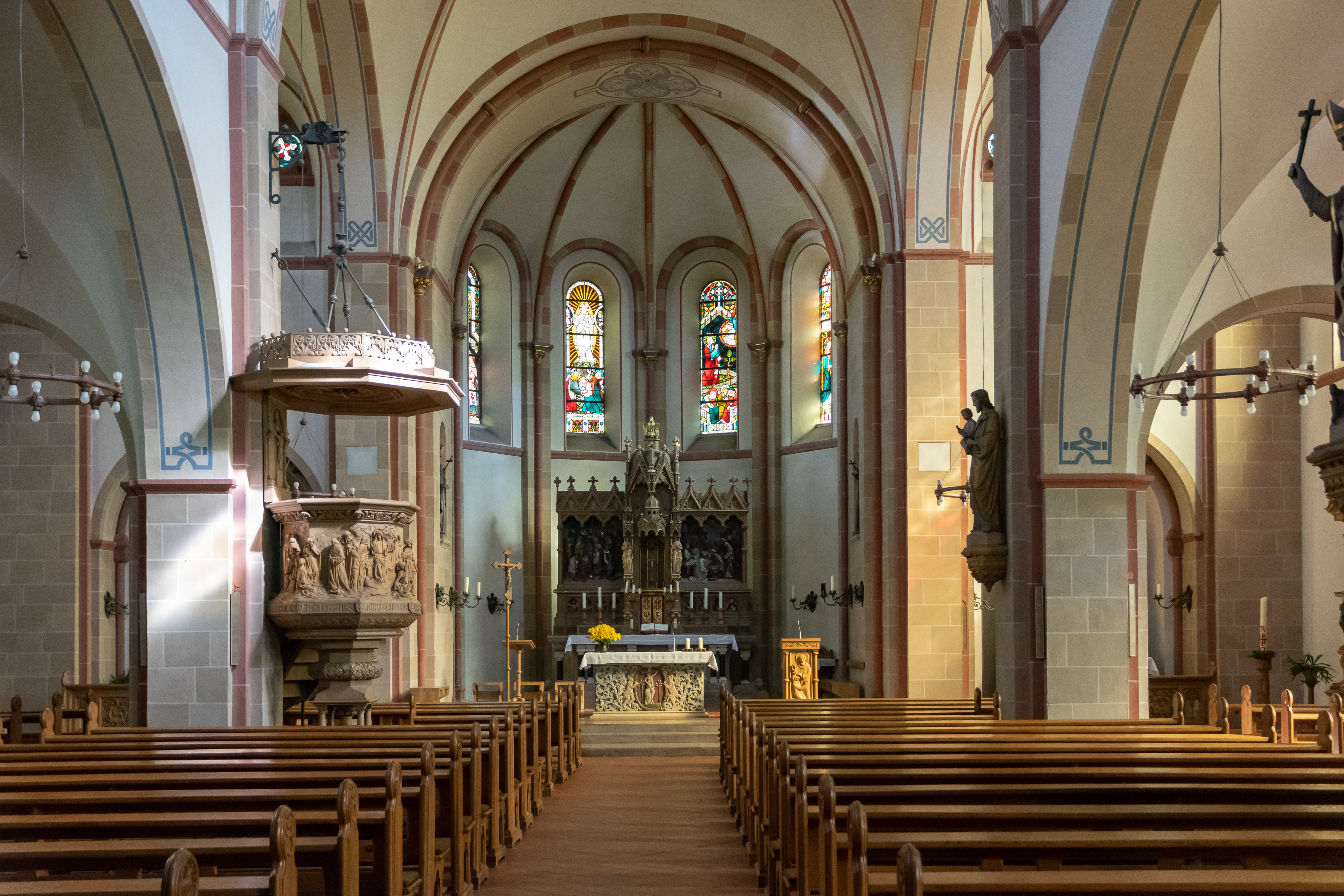 Innenraum der katholischen Pfarrkirche St. Elisabeth in Warburg-Rimbeck